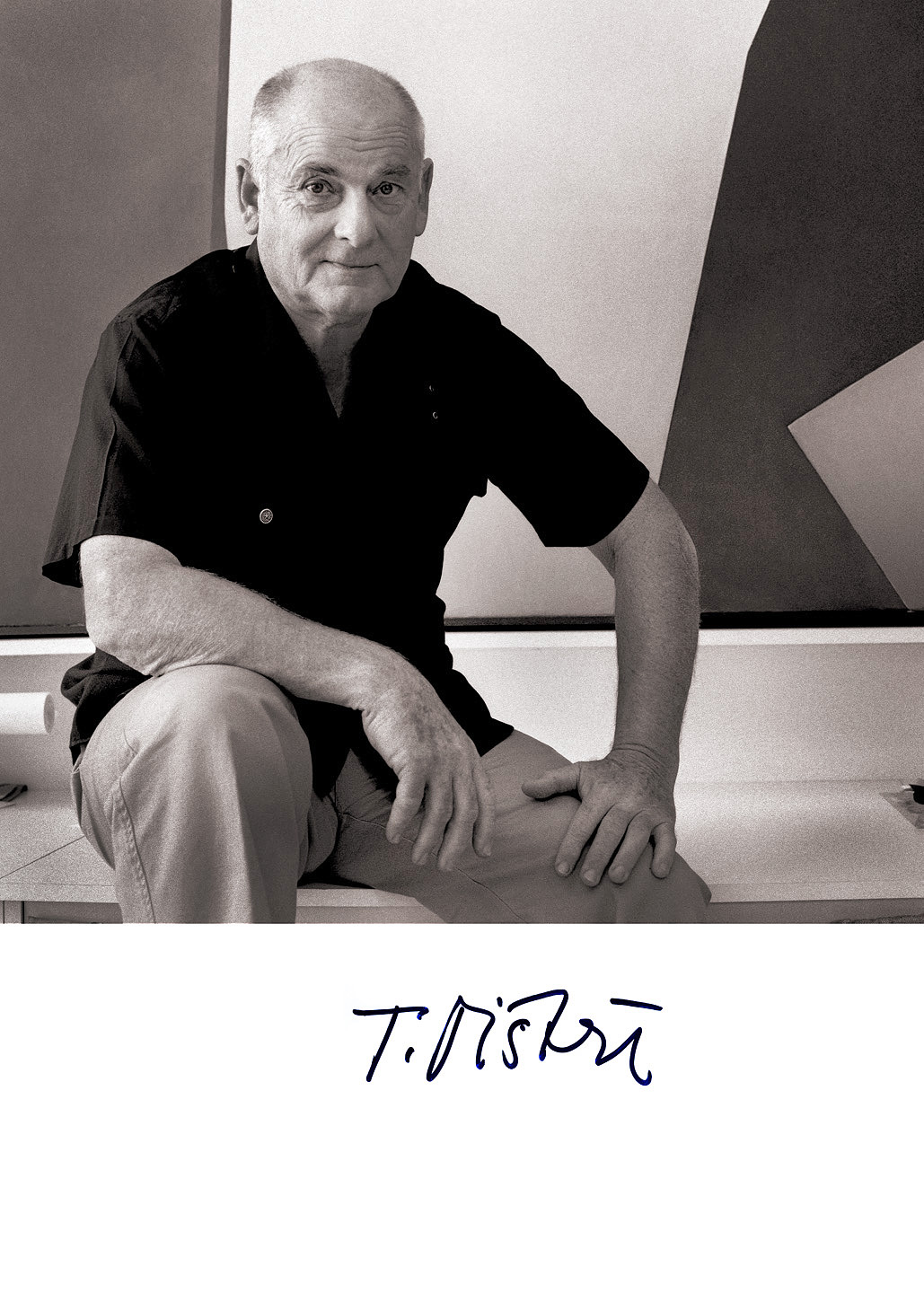 Jiří Jiroutek´s picture Cyklus: Osobnosti